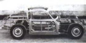 Bandini 1000 GT tratta dal libro Bandini